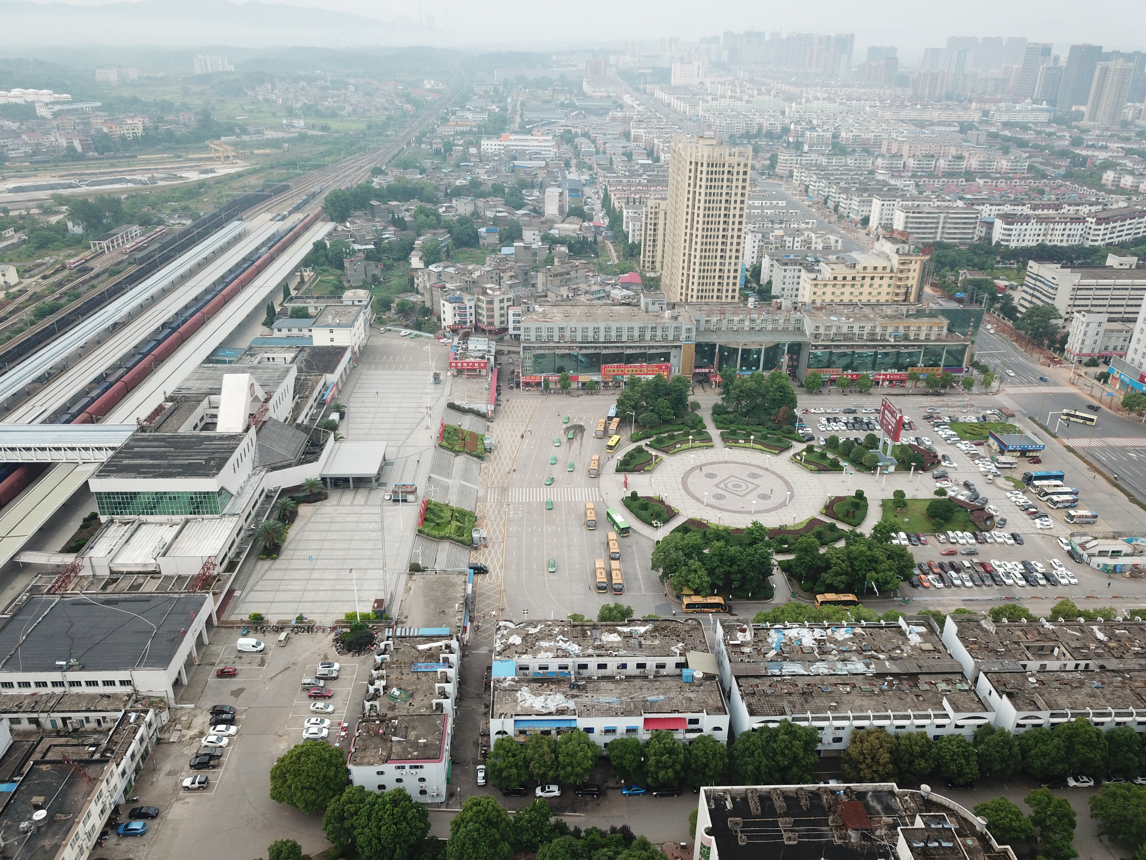 吉安站